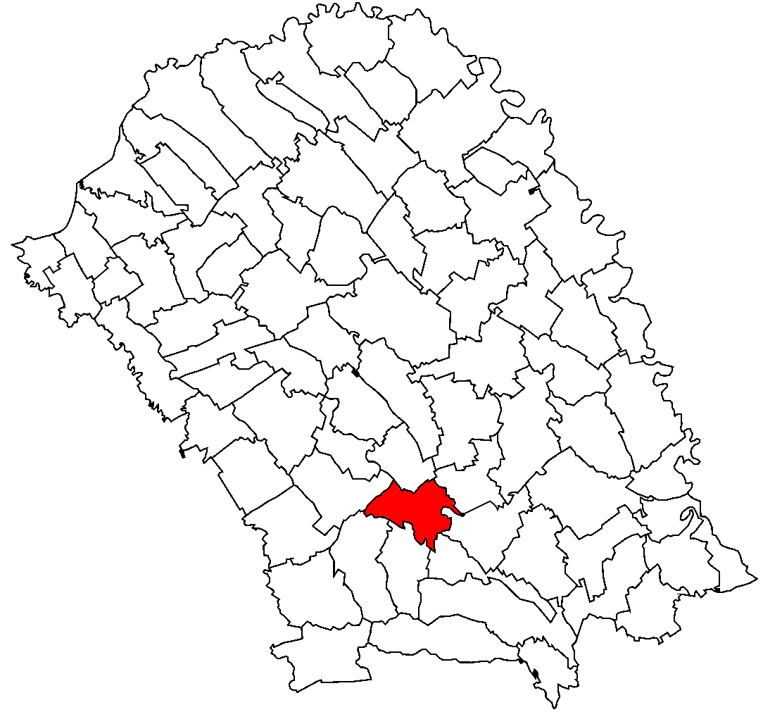 Categorie:Hărţi ale judeţului Botoşani